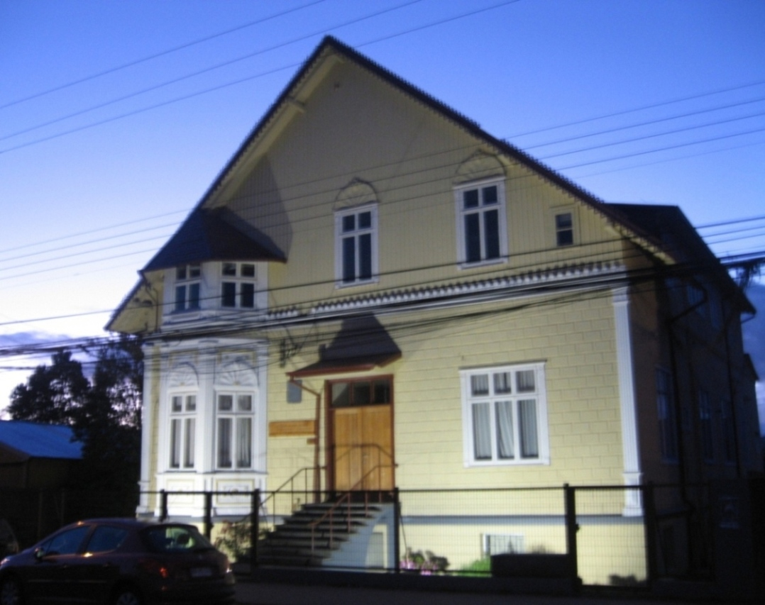 Centro de Educación Continua de la Universidad Austral de Chile en calle General Lagos, Valdivia, Chile.